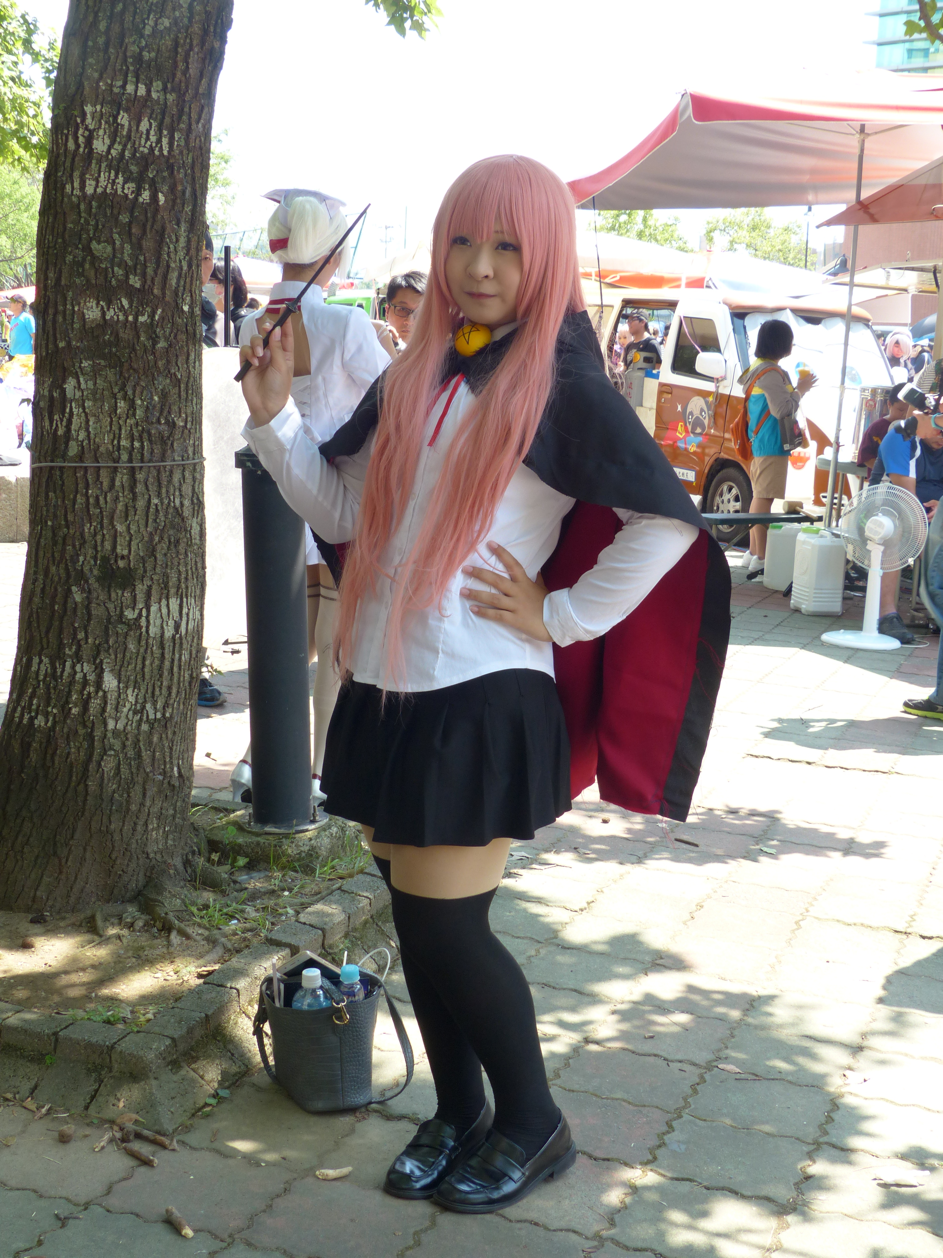 第46屆台灣同人誌販售會，《零之使魔》露易絲·法蘭西斯·露·布朗·杜·拉·瓦利埃爾cosplayer。